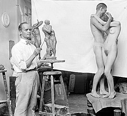 skulptören Carl Fredrik Skog under arbete i sin ateljé.